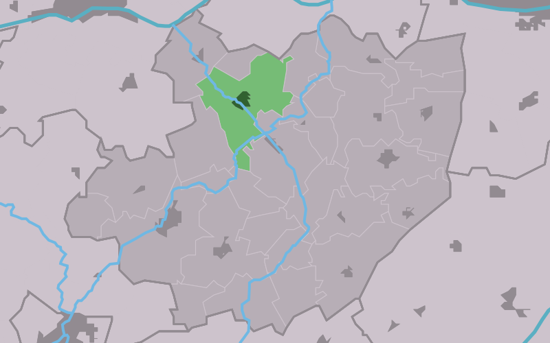 Kaartsje fan himrik fan Winsum